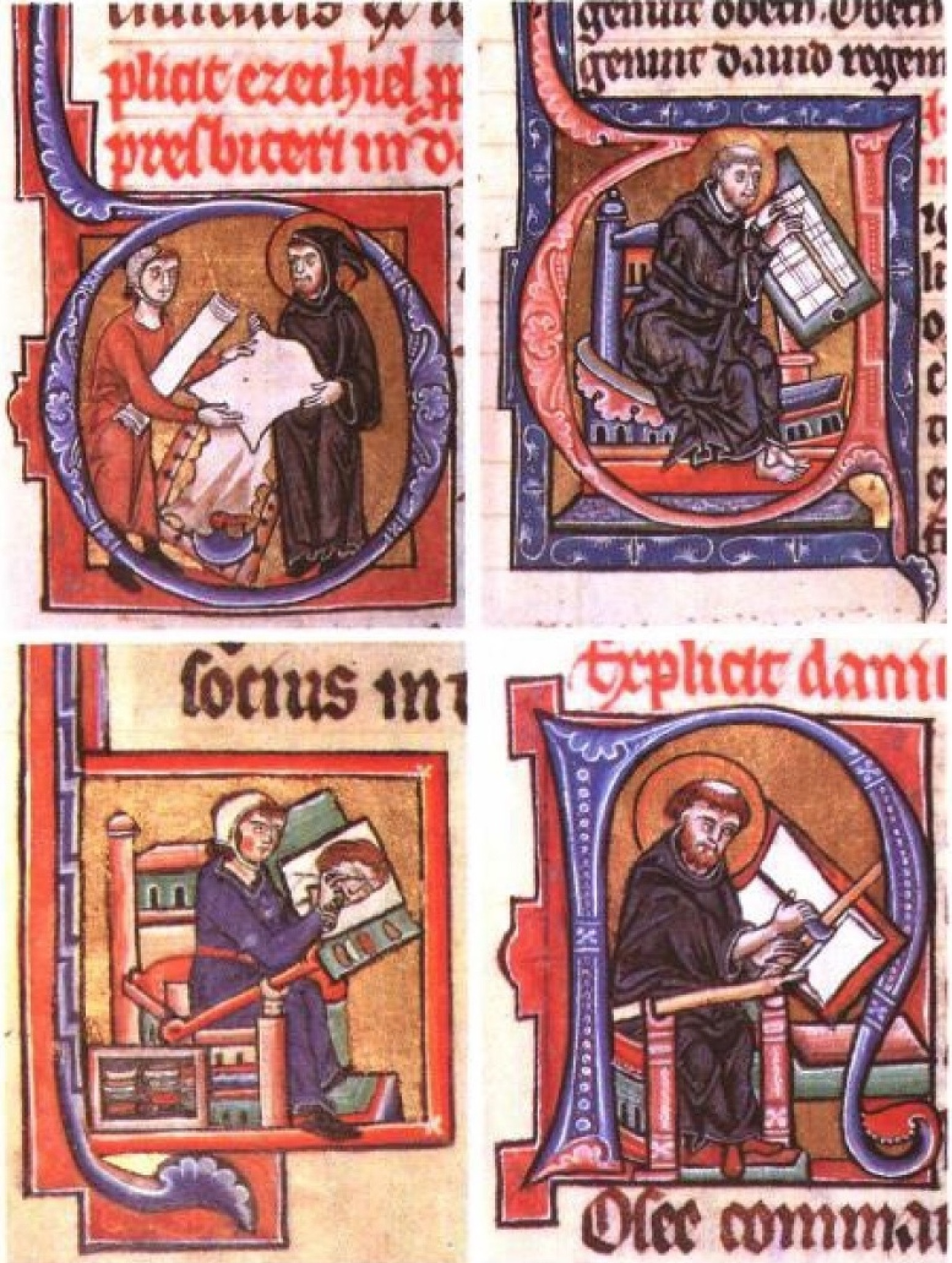 Cuatro etapas de la elaboración de un libro, miniaturas, siglo XIII. Biblioteca Kongelige, Dinamarca. Las iniciales manuscritas en Alemania a mediados del siglo XIII presentan los diversos estadios característicos del proceso de elaboración de un libro: entrega del pergamino a un monje, trazado de las líneas maestras por un ayudante, raspado de la vitela y ejecución de un retrato. – Ilustración en el libro La escritura: Memoria de la humanidad (p. 86) por Georges Jean, colección «Biblioteca ilustrada●Descubrir la arqueología» (nº 15), 2012. Descripción en la página 153.